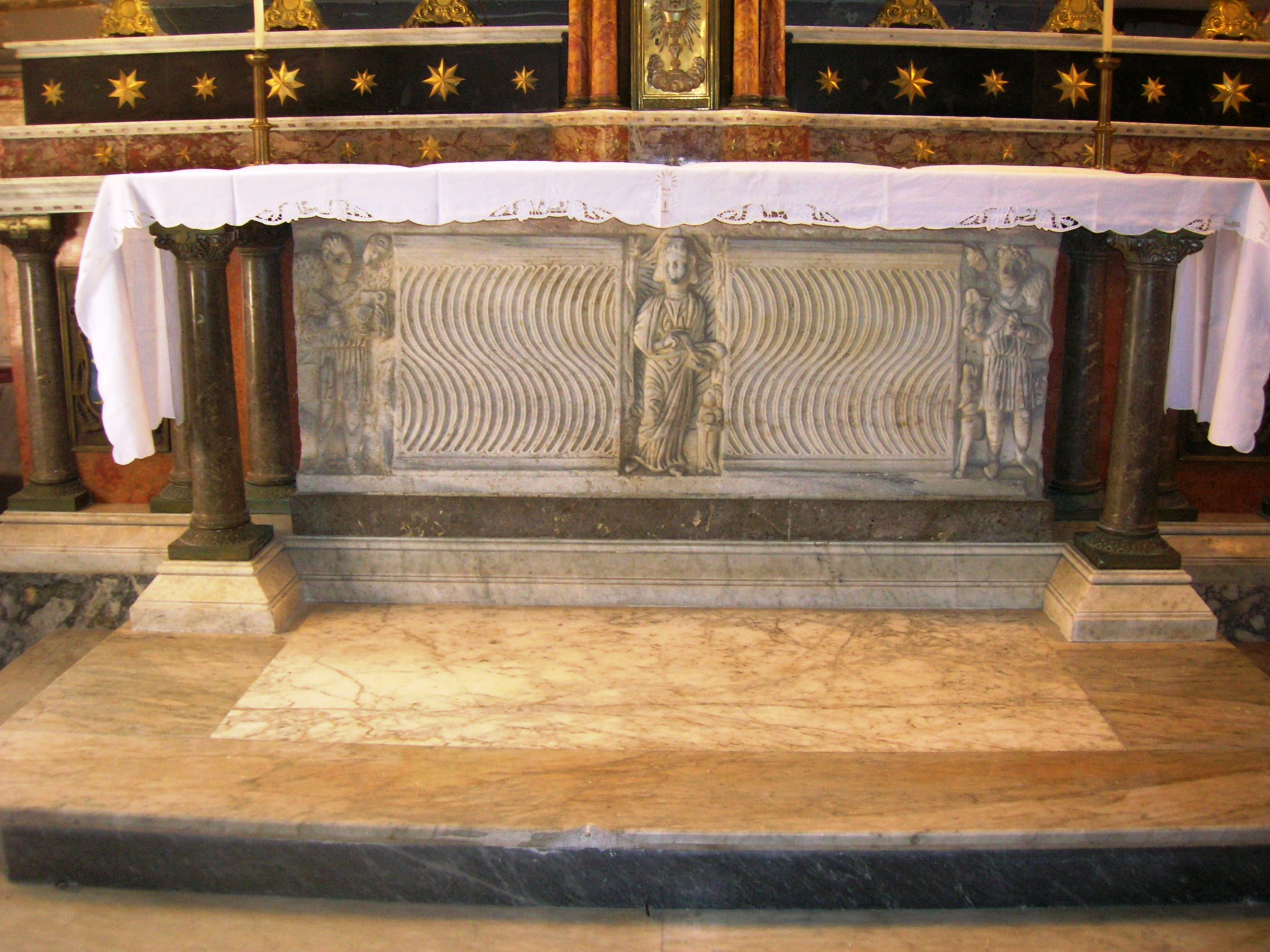 Il sarcofago del Buon Pastore utilizzato come altare della cappella di san Catello nella chiesa di Maria Santissima Assunta di Castellammare di Stabia